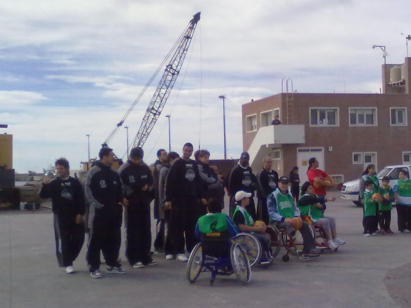 el equipo estelar de gimnasia de comodoro ayudando a su ciudad en la 4ª jornada de semifinales en el baila argentina 2010